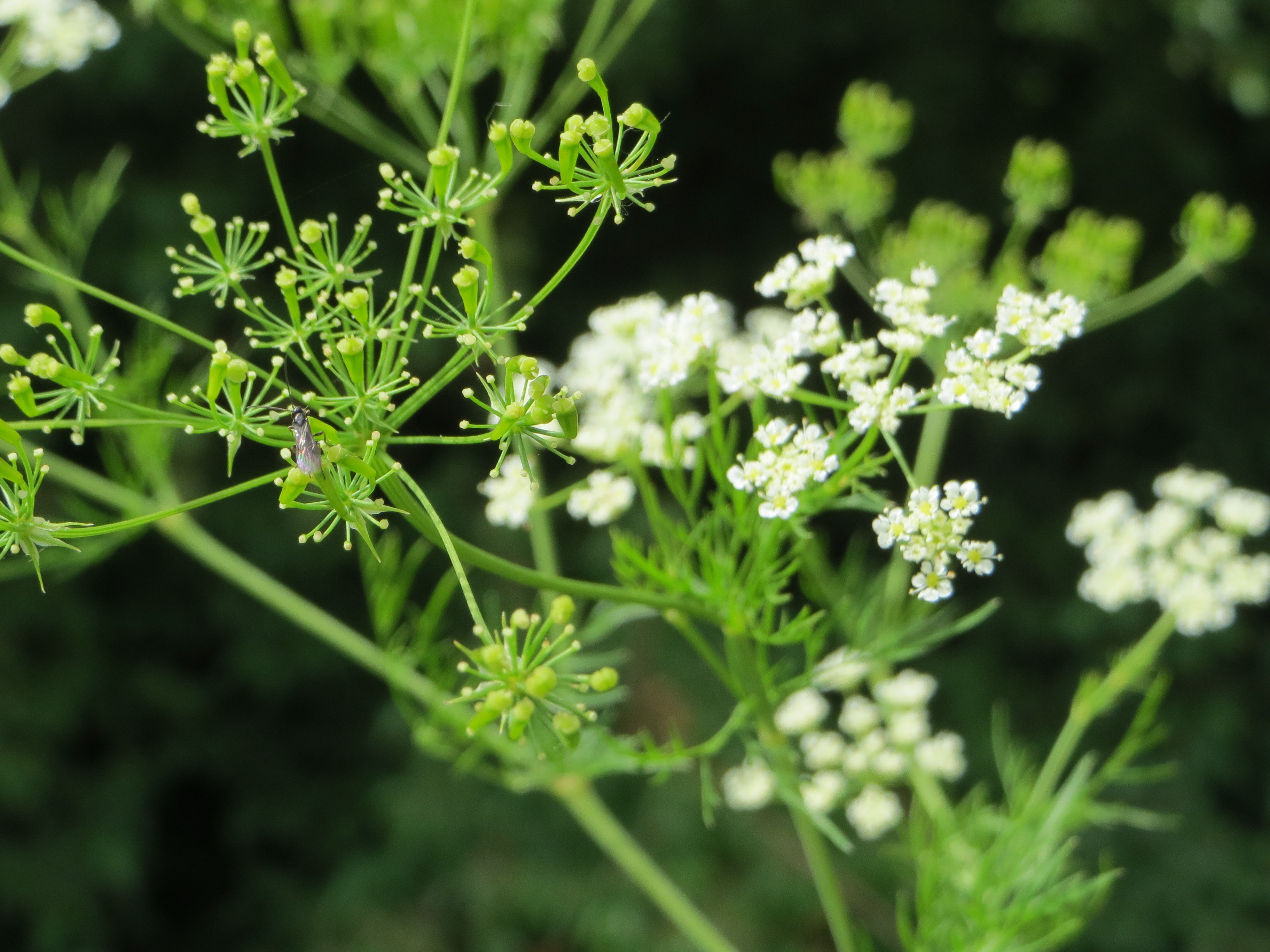 Knolliger Kälberkropf (Chaerophyllum bulbosum) im Landschaftsschutzgebiet Hockenheimer Rheinbogen